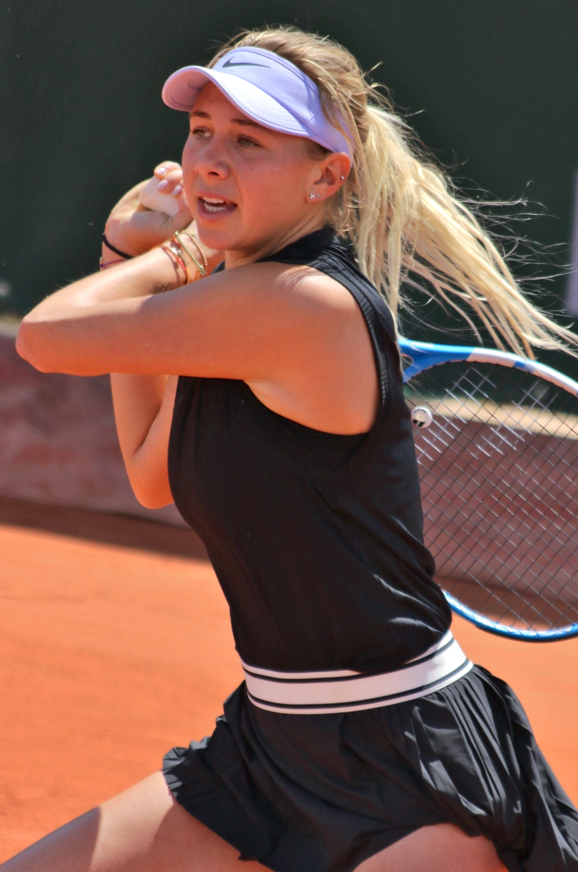 Anisimova RG19 (32)